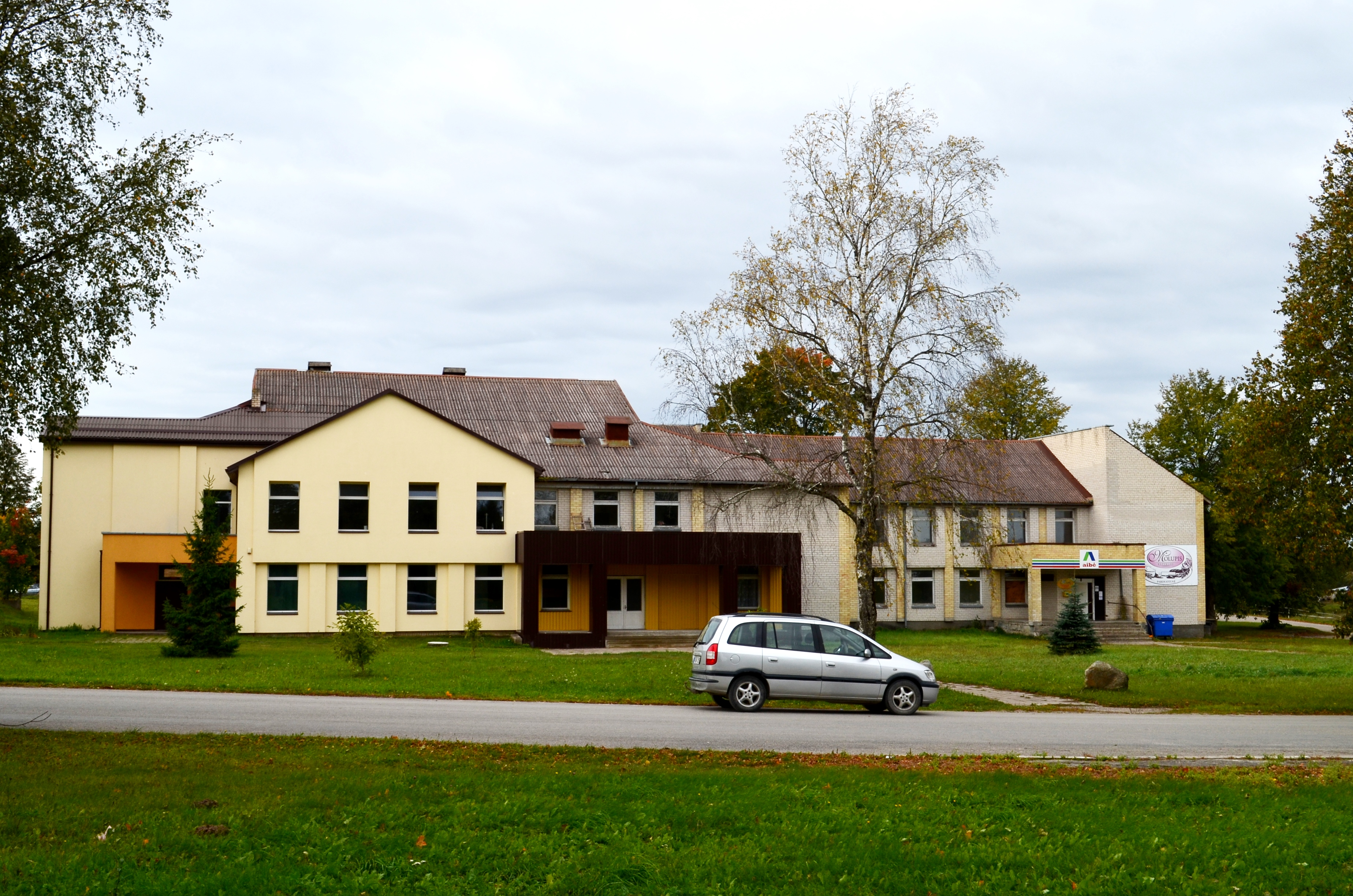 Karklėnai, Kelmės raj.